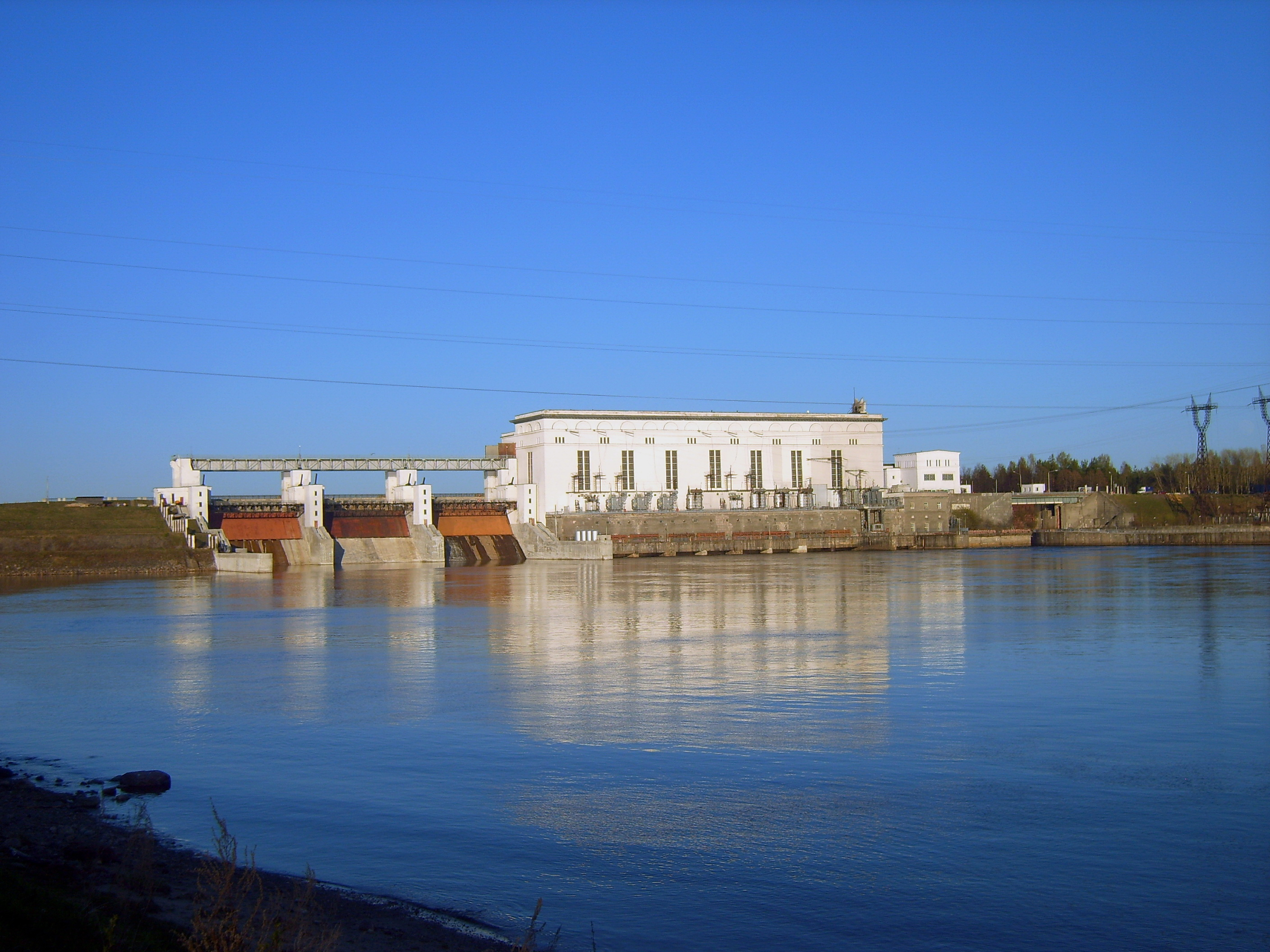 Верхнесвирская ГЭС в Подпорожье